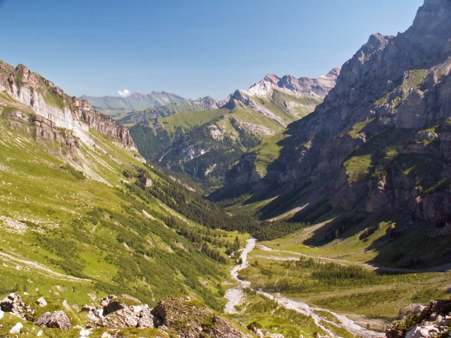 vue du haut du vallon